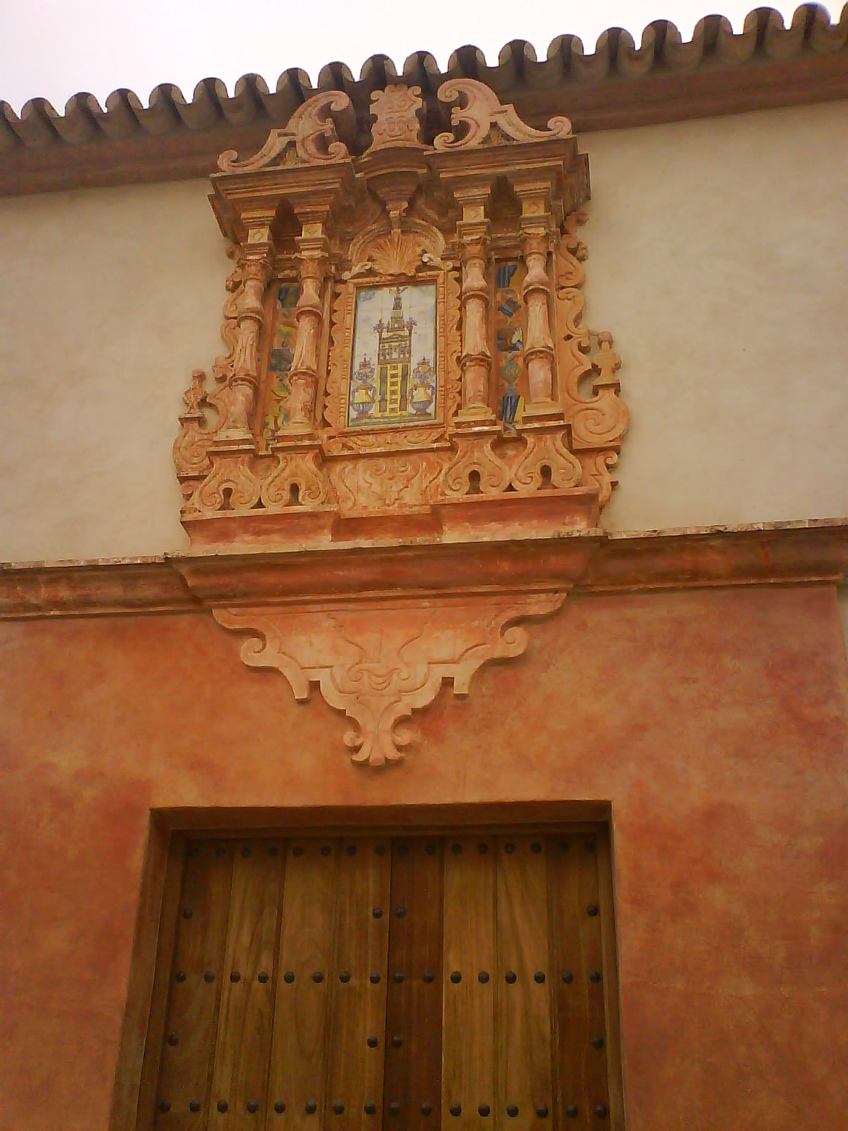 Detalle de la fachada de la Cilla del Cabildo en Sanlúcar la Mayor